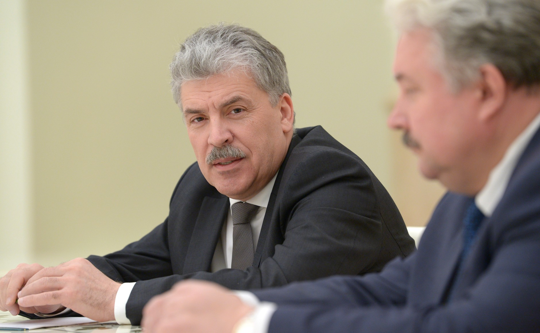 Кандидат от Коммунистической партии Российской Федерации Павел Грудинин перед встречей с Владимиром Путиным